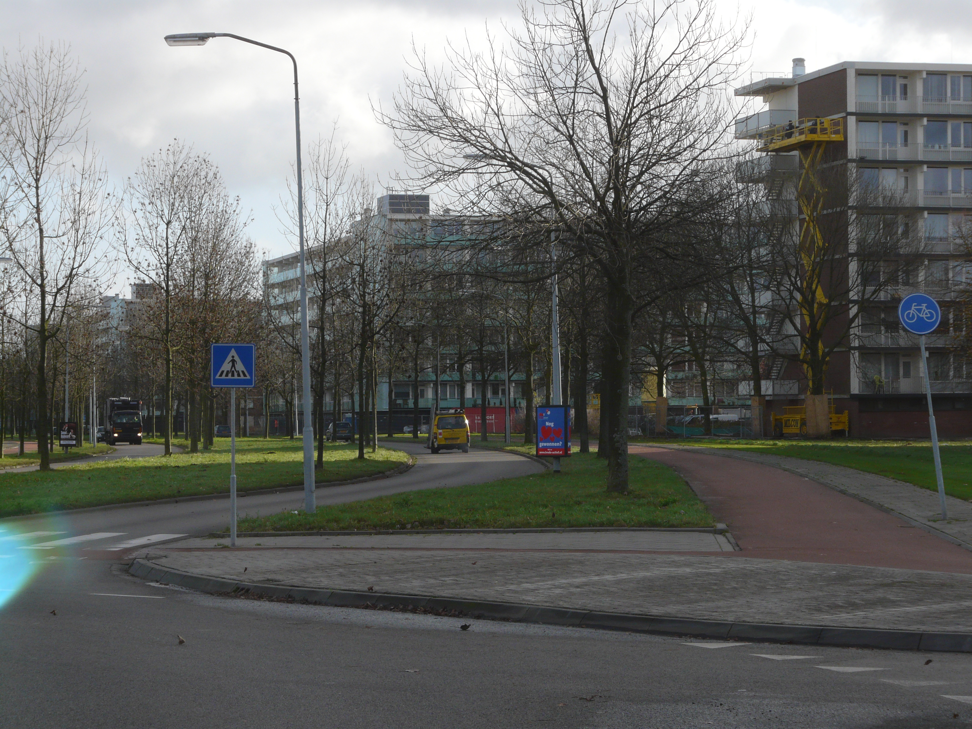 Zicht op een deel van de doorgaande straat de Groenedijk, Breda in Breda. Gelegen tussen de wijken Biesdonk en de Wisselaar. In het stadsdeel de Hoge Vucht. Niet ver van het winkelcentrum Hoge Vucht in het noorden van Breda